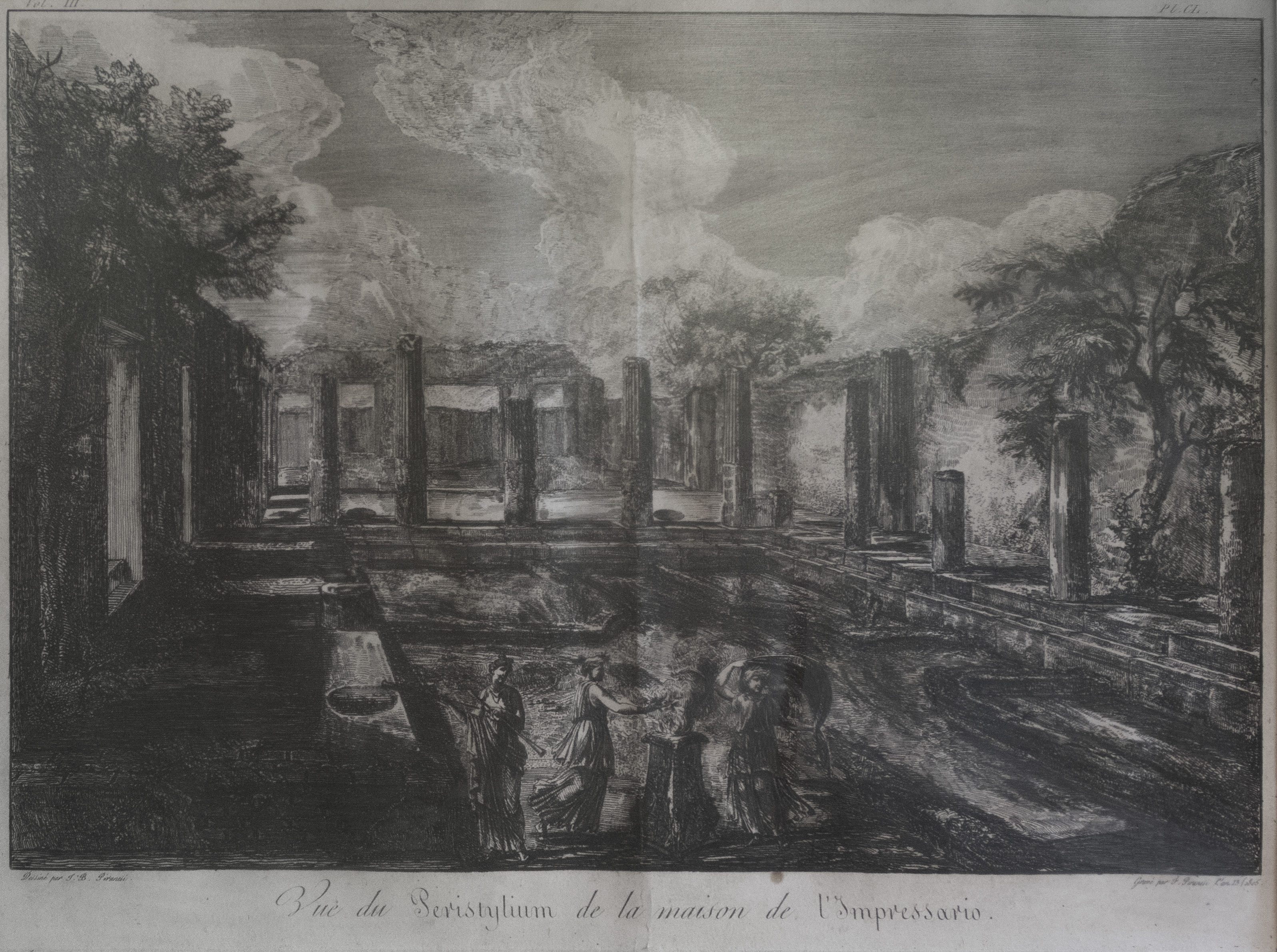 gravure